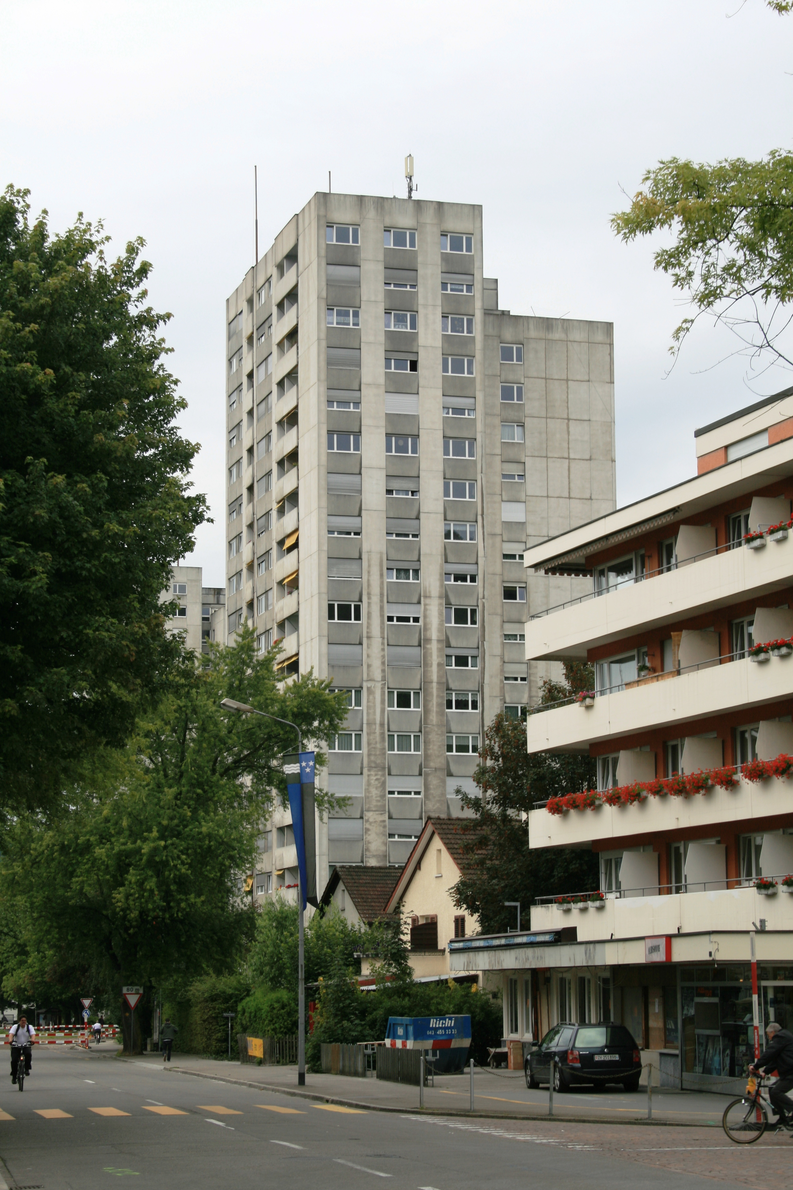 Alberich Zwyssig-Strasse, Wettingen AG, Schweiz